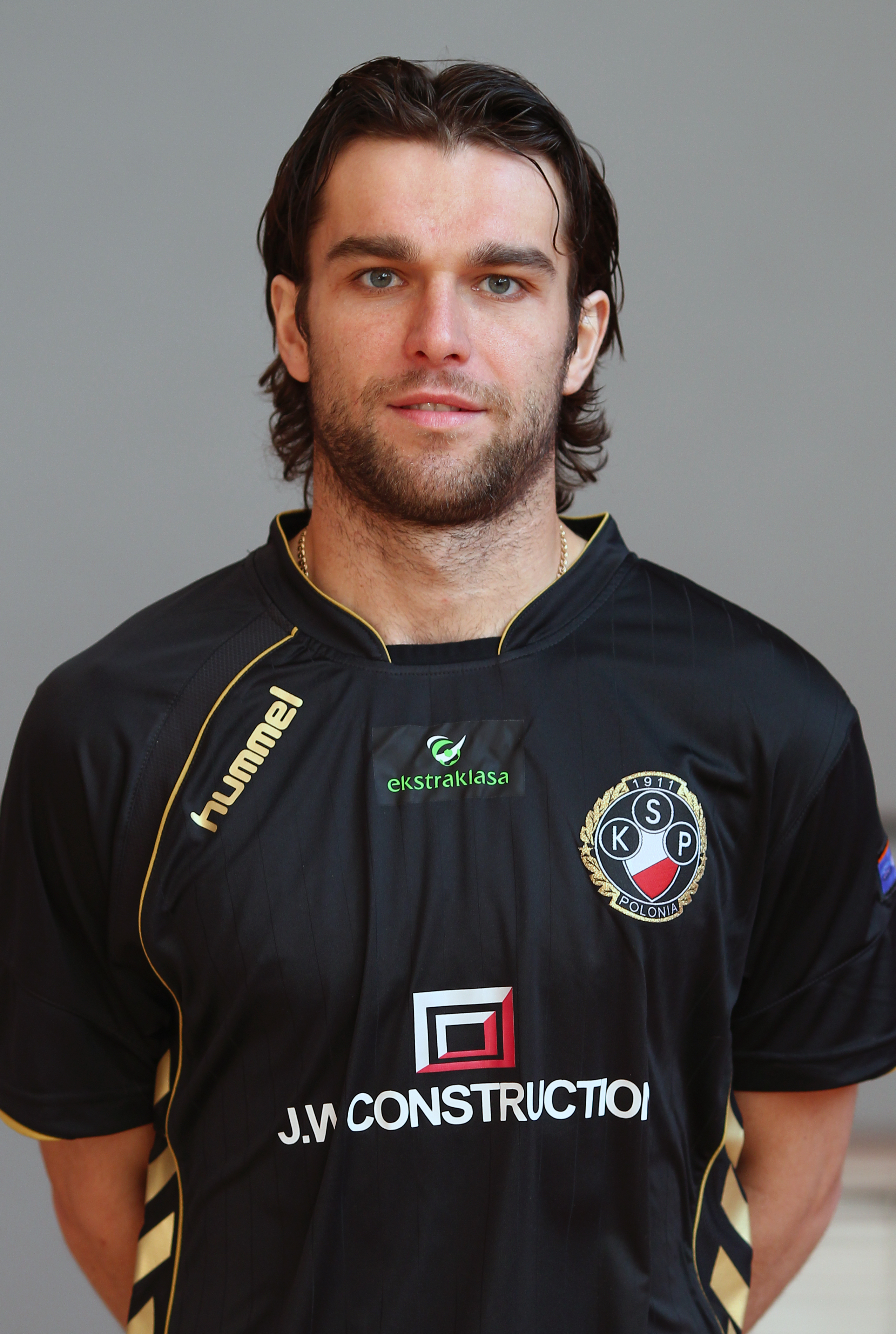 Patryk Rachwał, player of Polonia Warszawa (2011)